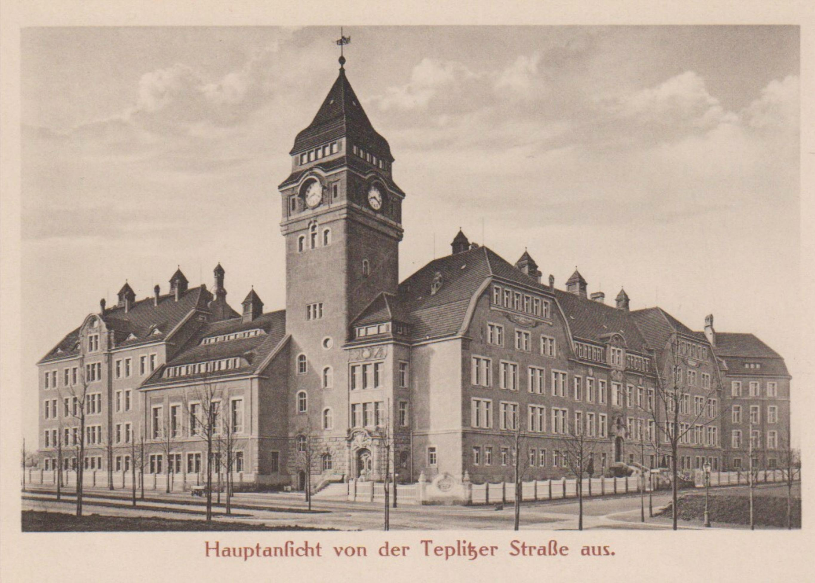 Dresden, Königliches Lehrerseminar Dresden-Strehlen (nach Wiederaufbau TU-Gebäude am Weberplatz) – Hauptansicht Teplitzer Str. 1910